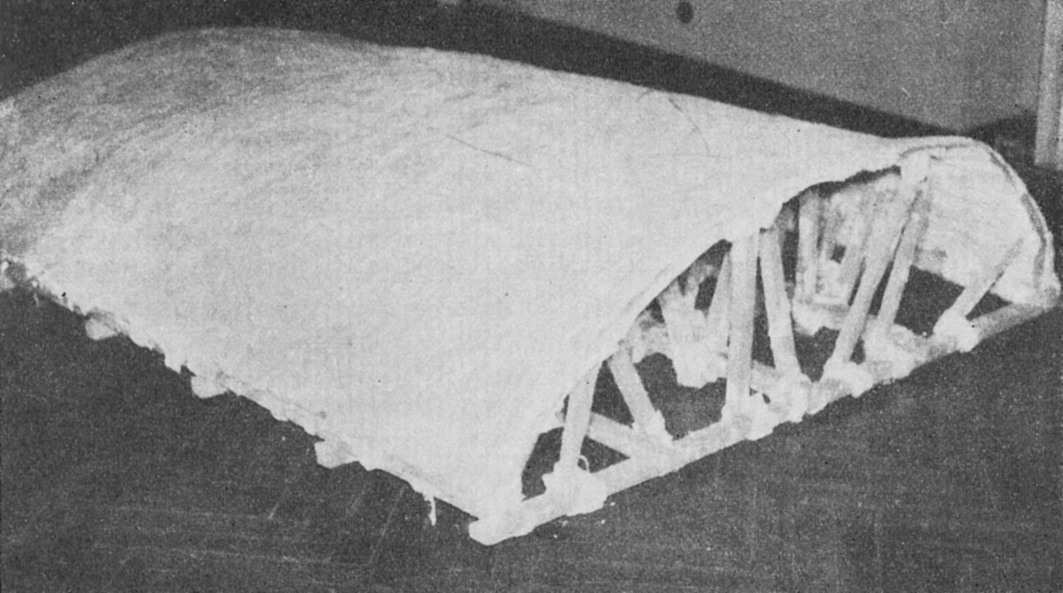 Prace konserwatorskie przy malowidłach z Faras w Muzeum Narodowym w Warszawie. Przedstawienie z niszy (Matka Boska z Dzieciątkiem) po przewiezieniu do Warszawy, widoczna konstrukcja podtrzymująca zdjęte ze ściany malowidło.